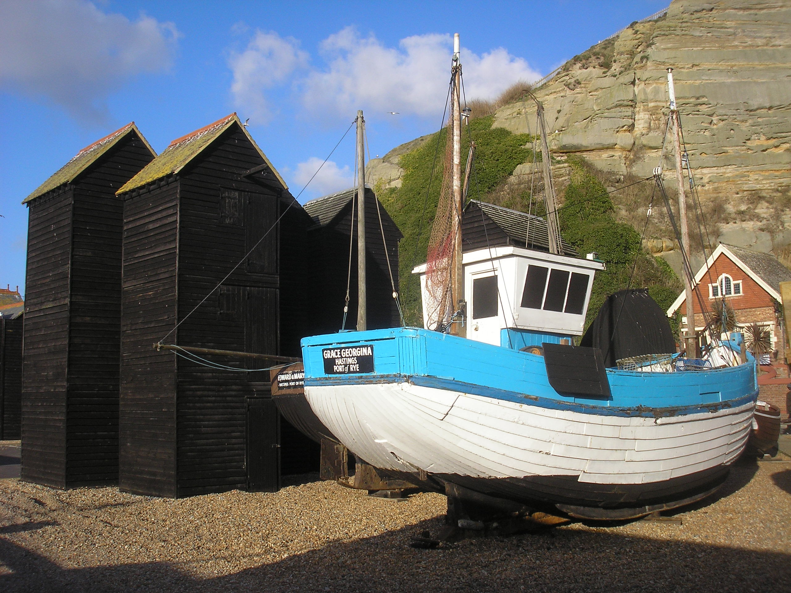 The "Net shops" (wooden buildings used by fishermen to store their nets) on The Stade, Hastings, Sussex